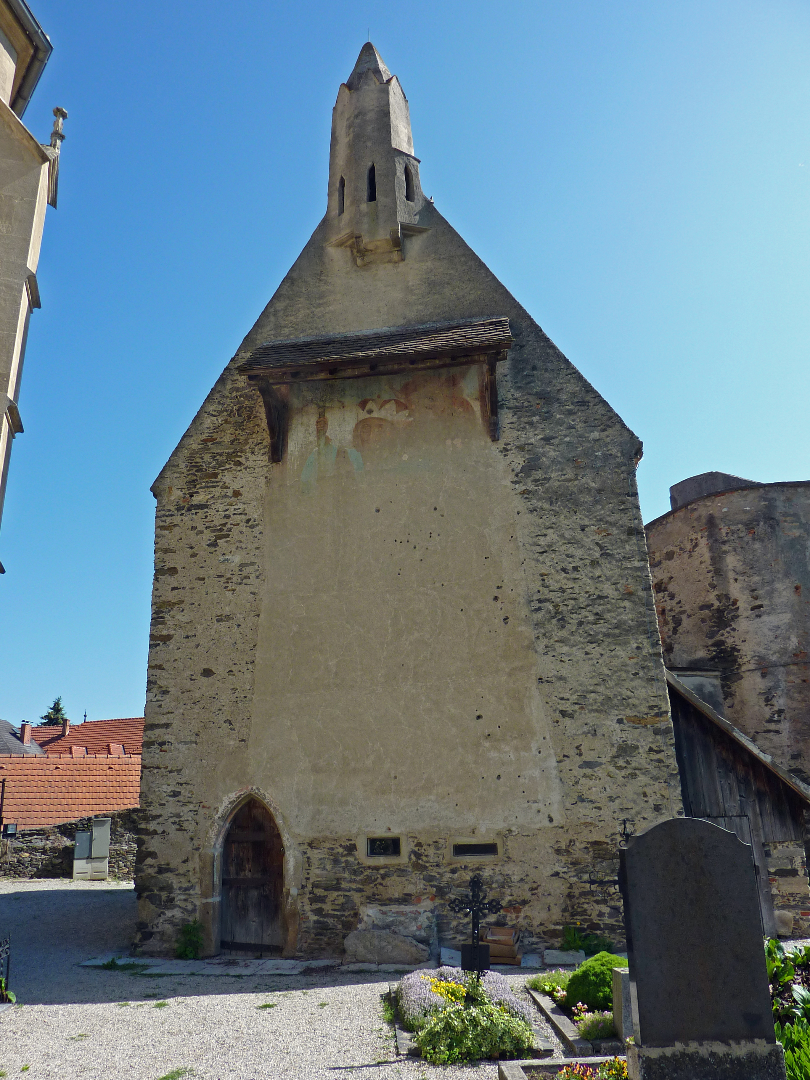 Karner bei der Filialkirche in St. Michael, Weißenkirchen in der Wachau, Niederösterreich